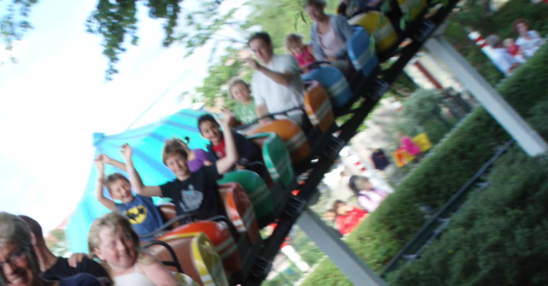 Cirkusexpressen, Liseberg 2007.